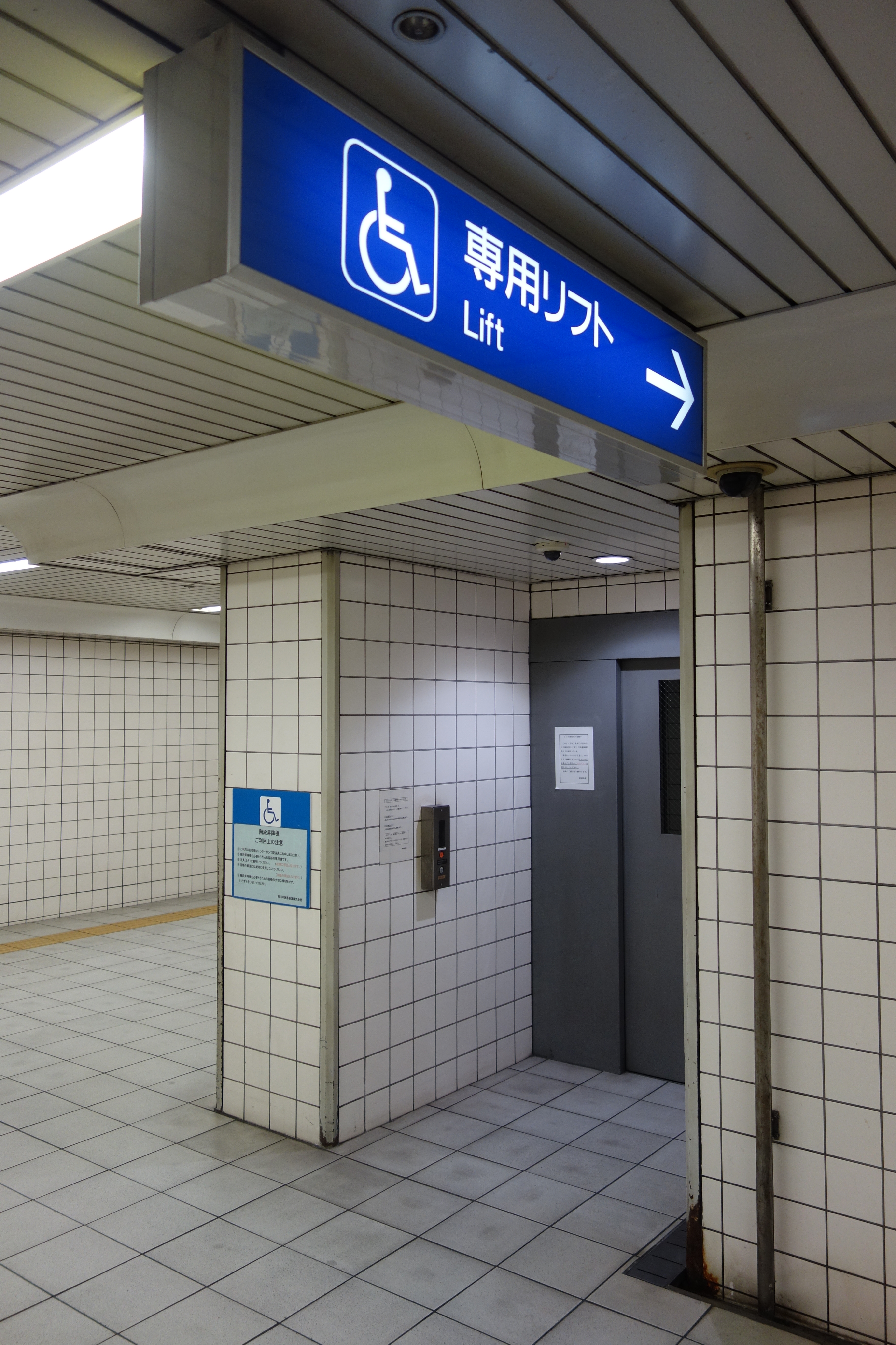 JR東西線 新福島駅 車いす専用リフト